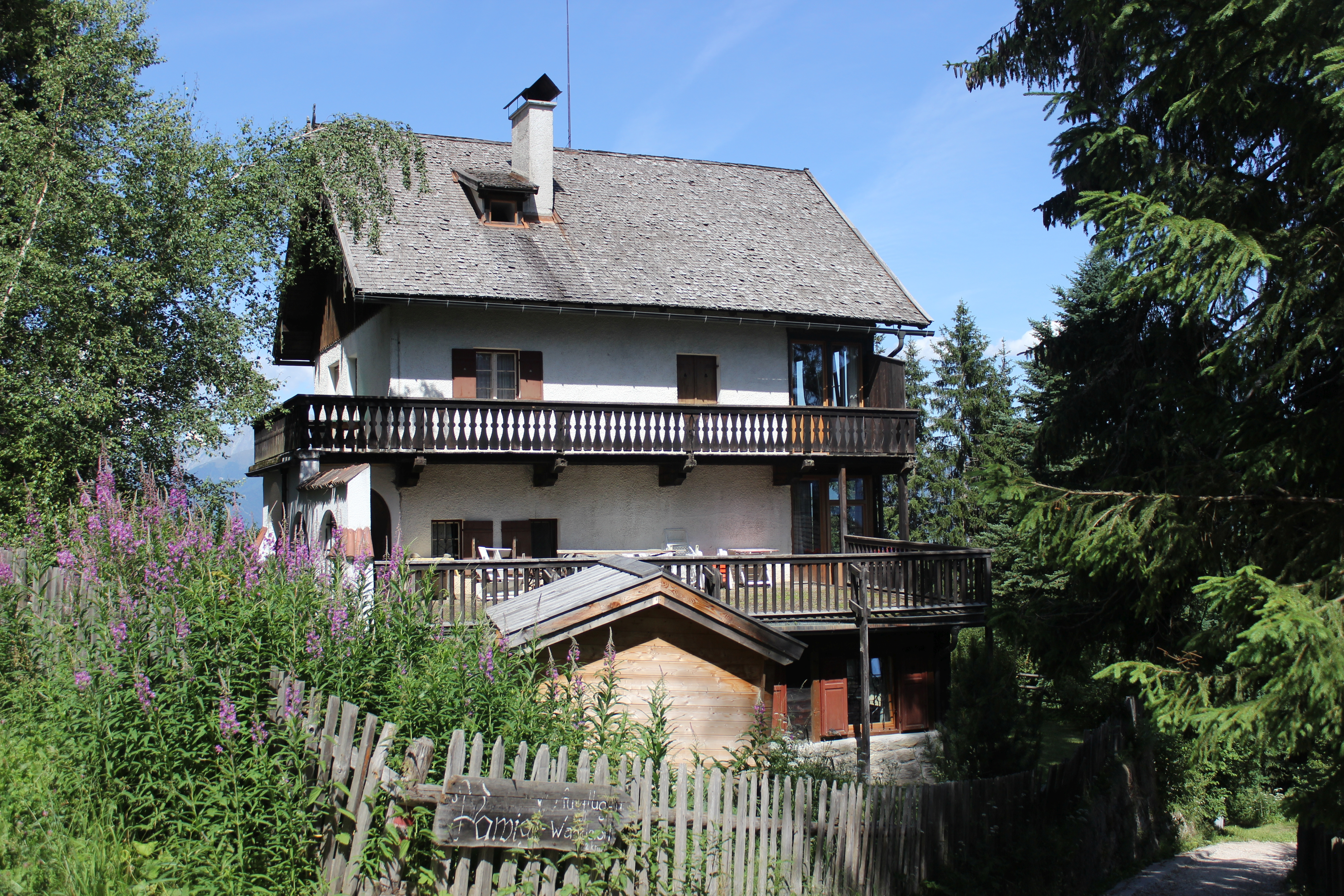 Ehemalige Sommervilla Dr. Hans Frank in Pawigl (Lana)